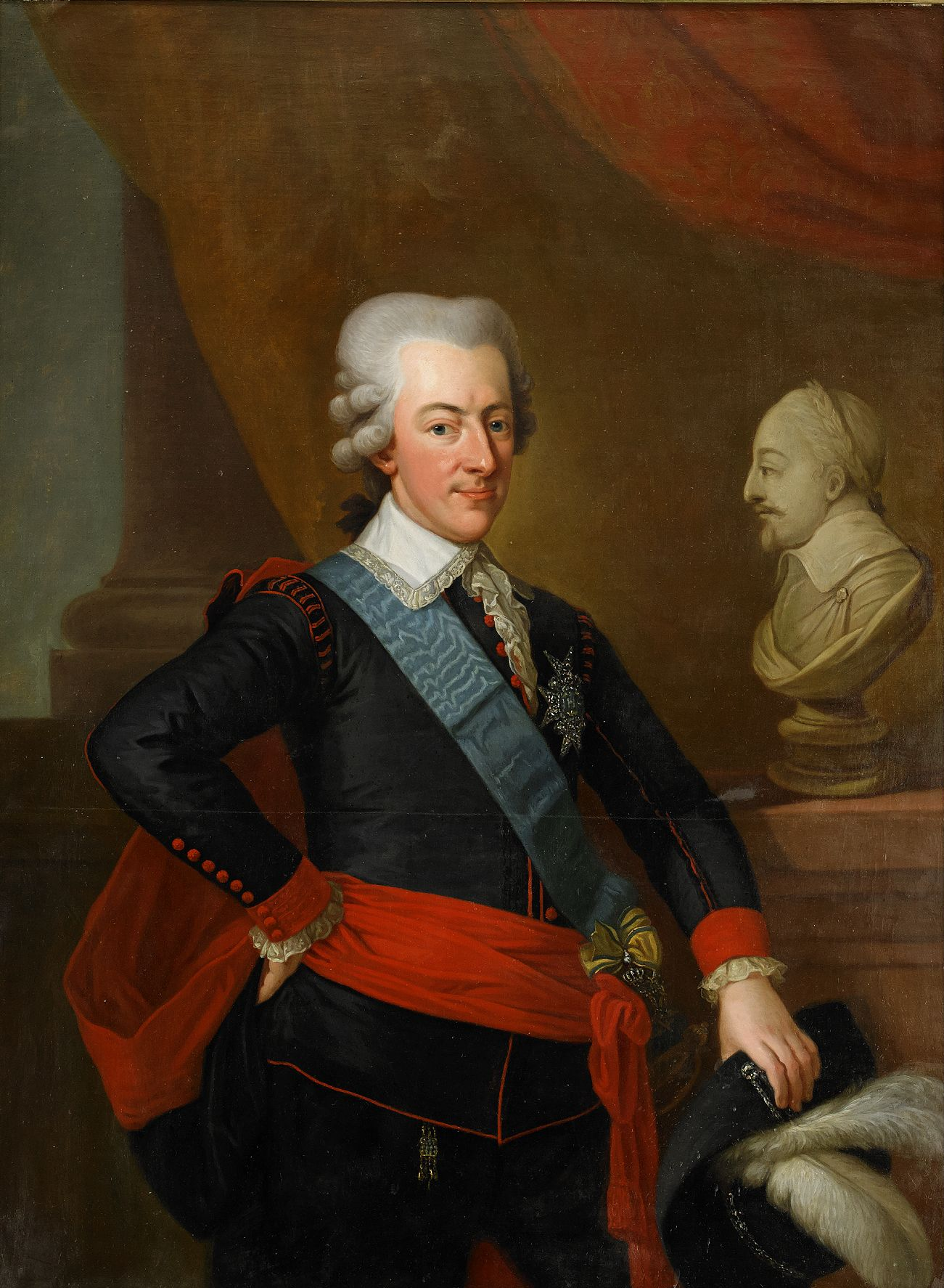 Porträtt av Gustav III - Sveriges konung - iklädd svenska dräkten och bärandes serafimerordens ljusblå band, ordenstecken och kraschan - stående knäbild. Målad av Per Krafft d.ä. (1724-1793). Bär inskription på dukens baksida GUSTAF DEN IIIDIE ORIGINAL.AF.KRAFT. Målningen är sannolikt en replik efter porträttet av Gustav III som monarken skänkte 1786 till Kungliga Vitterhetsakademien.